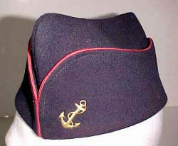 calot des troupes coloniales Troupes de marine (France) .